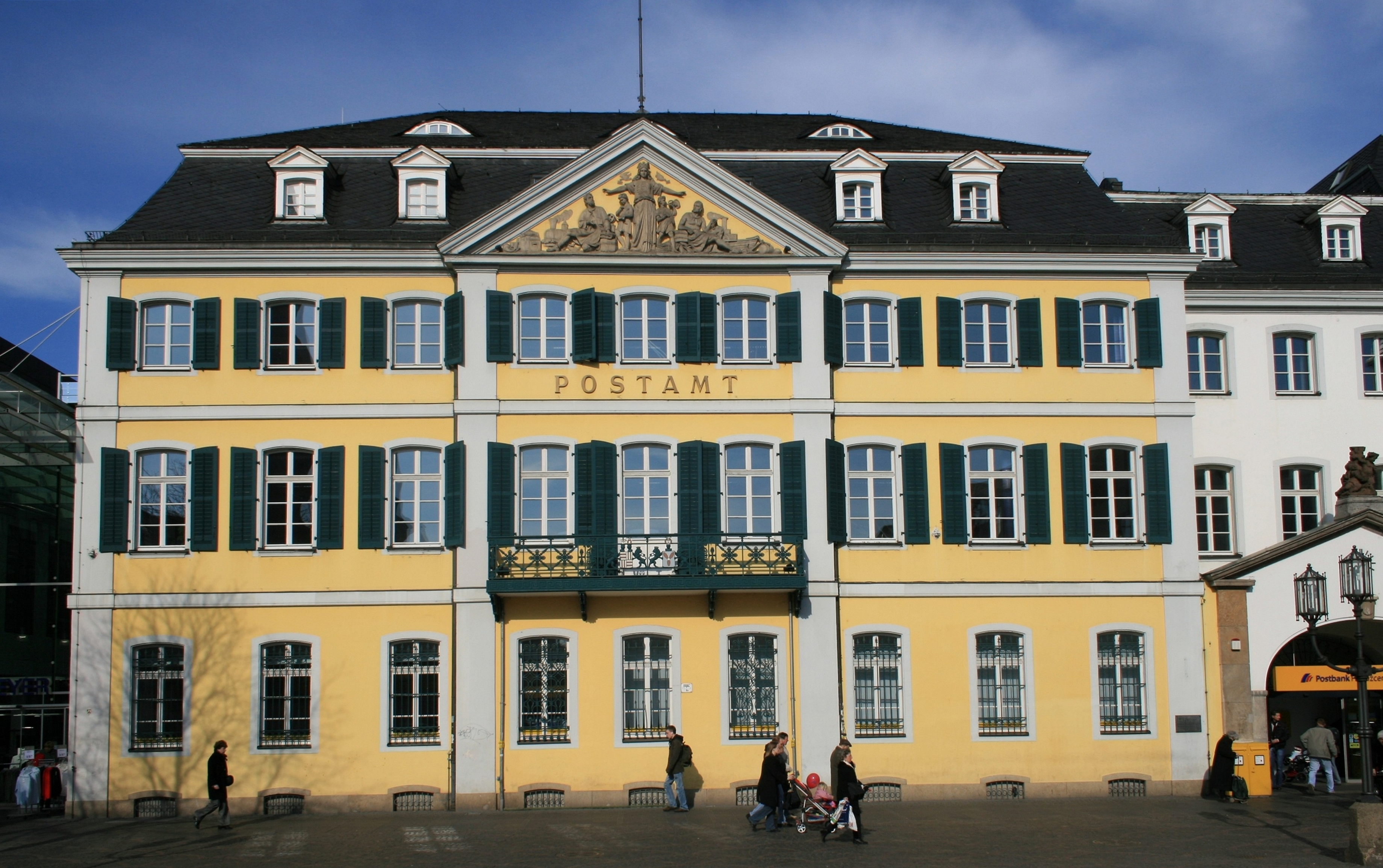 Bonn: Ehemalige Hauptpost am Münsterplatz.